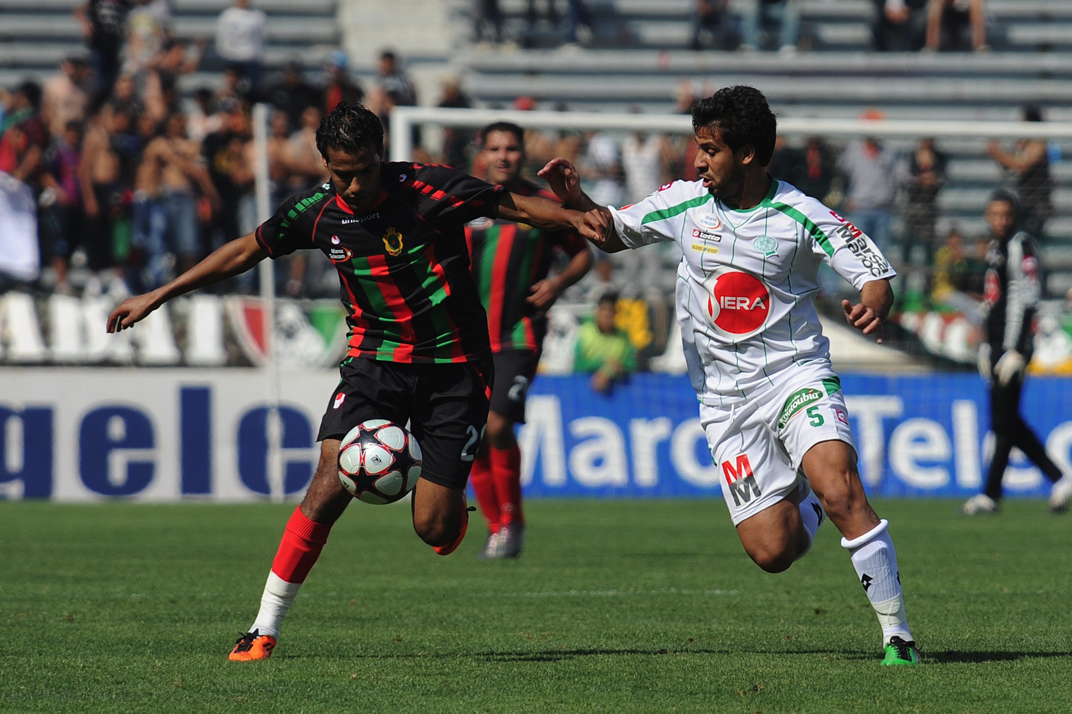 Raja vs FAR